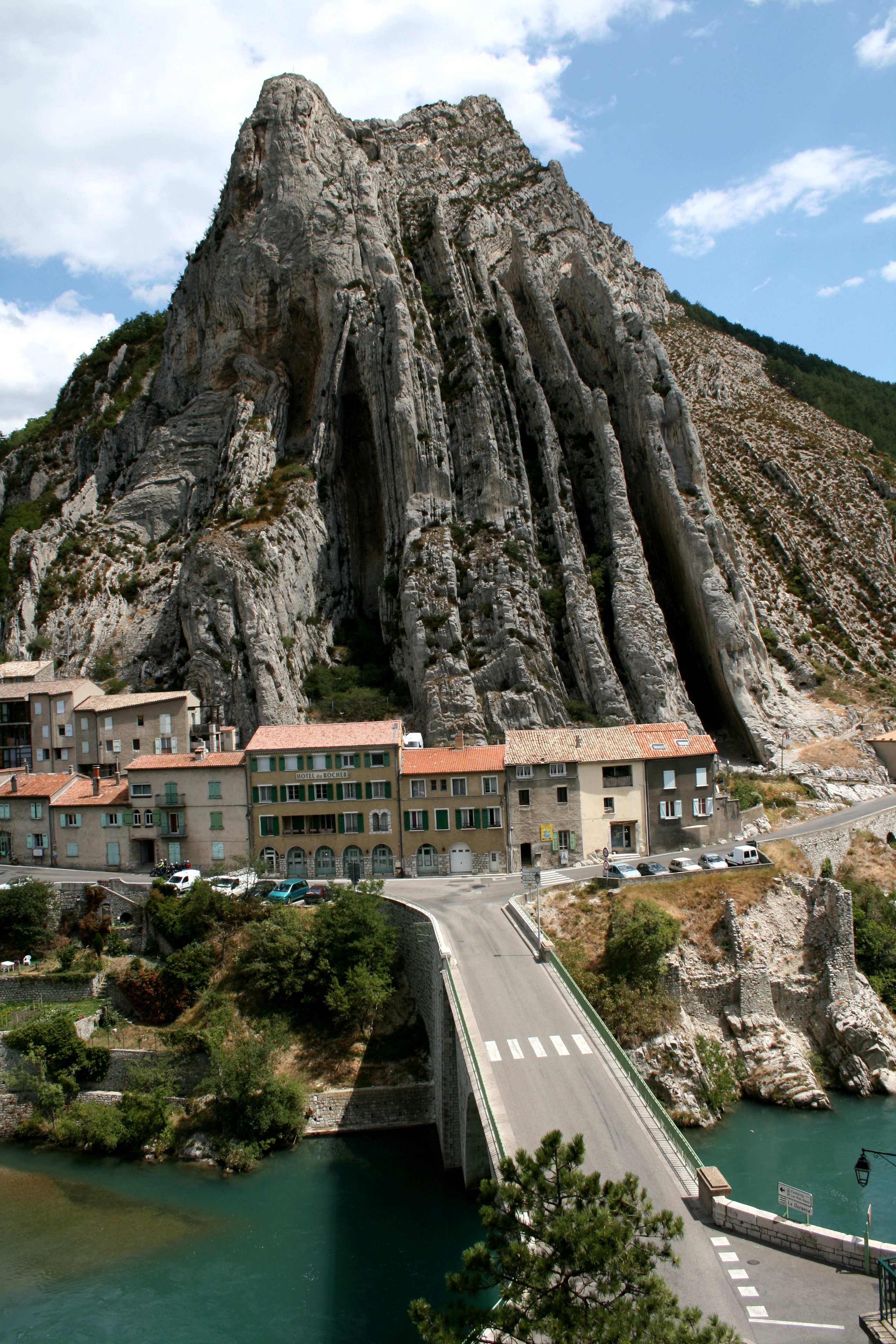 Sisteron, Provence, Frankreich